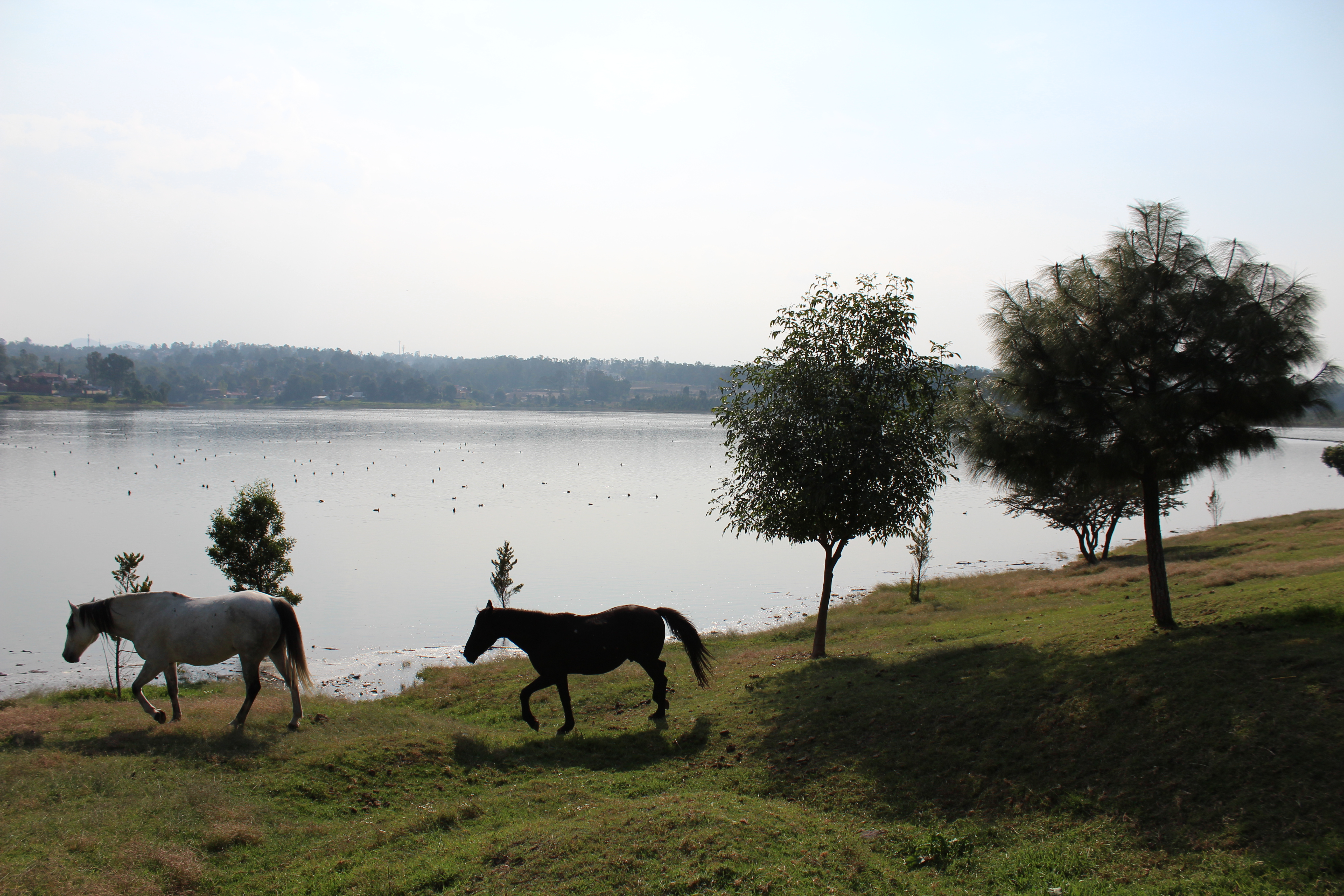 Caballos en el Lago de Guadalupe.